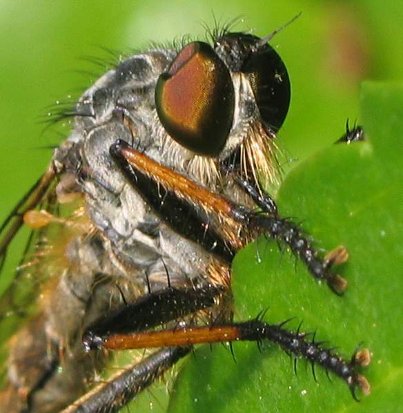 Gemeiner Strauchdieb (Neoitamus cf. cyanurus) Zur Bestimmung: Eine Unterscheidung von Weibchen von Neoitamus cyanurus und Neoitamus socius ist anhand von Fotos nicht zweifelsfrei möglich. Author: soebe Date: June 20, 2006 Location: Hamburg, Northern Germany Taken by Soebe in Northern Germany (Hamburg) and released under GNU FDL.